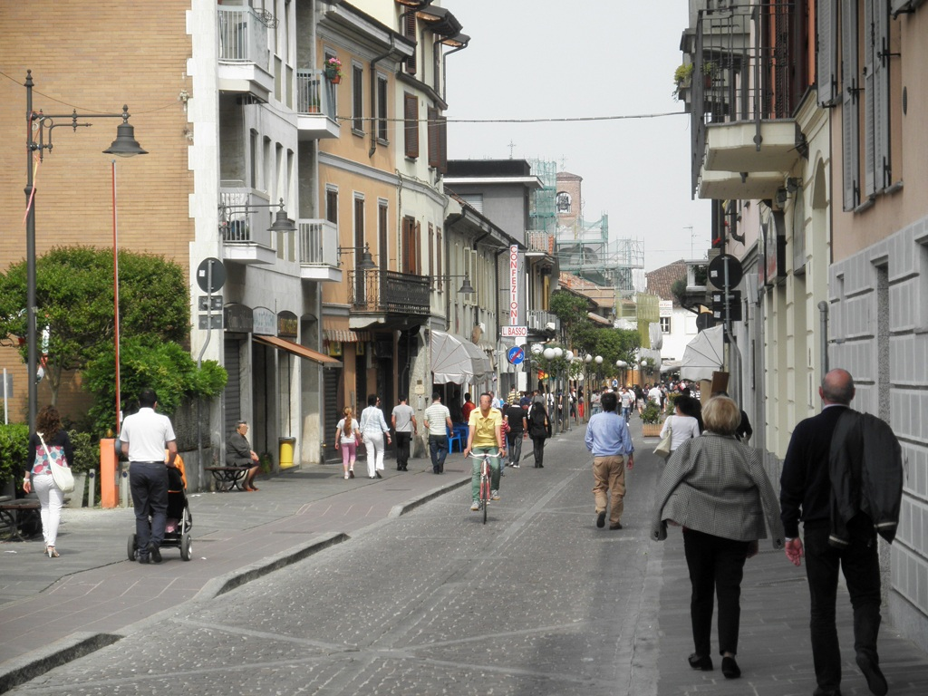 Via Zuavi a Melegnano